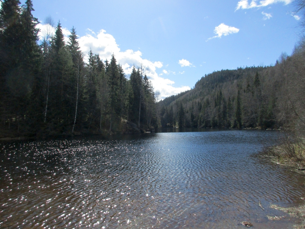 Mønevannet i Losbymarka, en del av Østmarka, Oslo. Bilde tatt i april 2016.